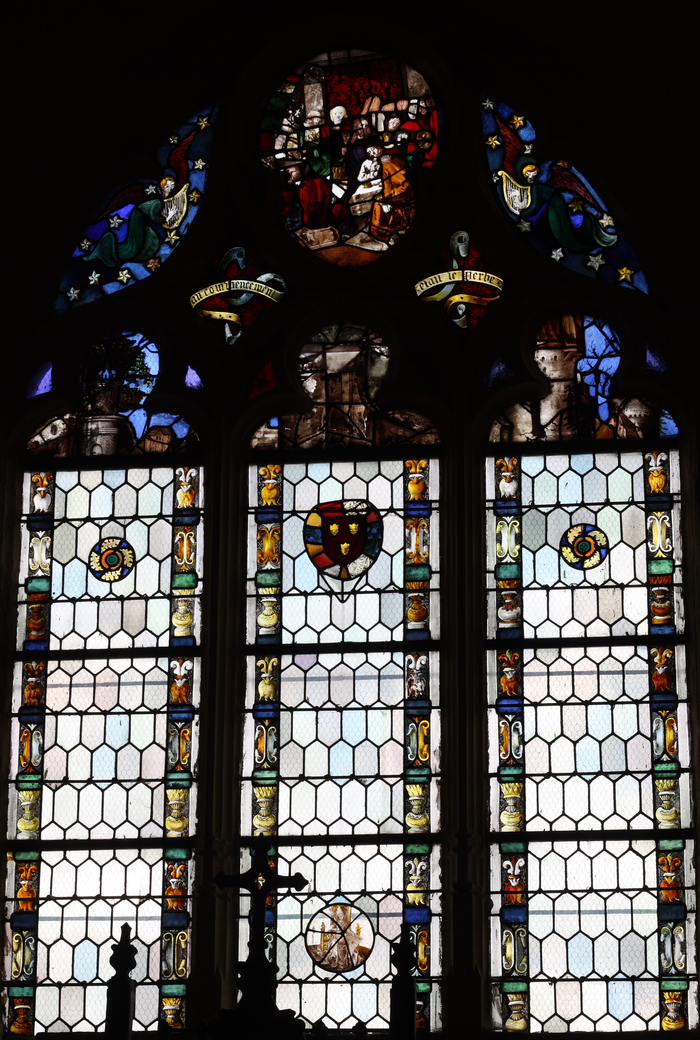 Katholische Pfarrkirche Saint-Martin in Triel-sur-Seine, einer Gemeinde im Département Yvelines (Île-de-France), Bleiglasfenster mit Fragmenten aus dem 16. Jahrhundert